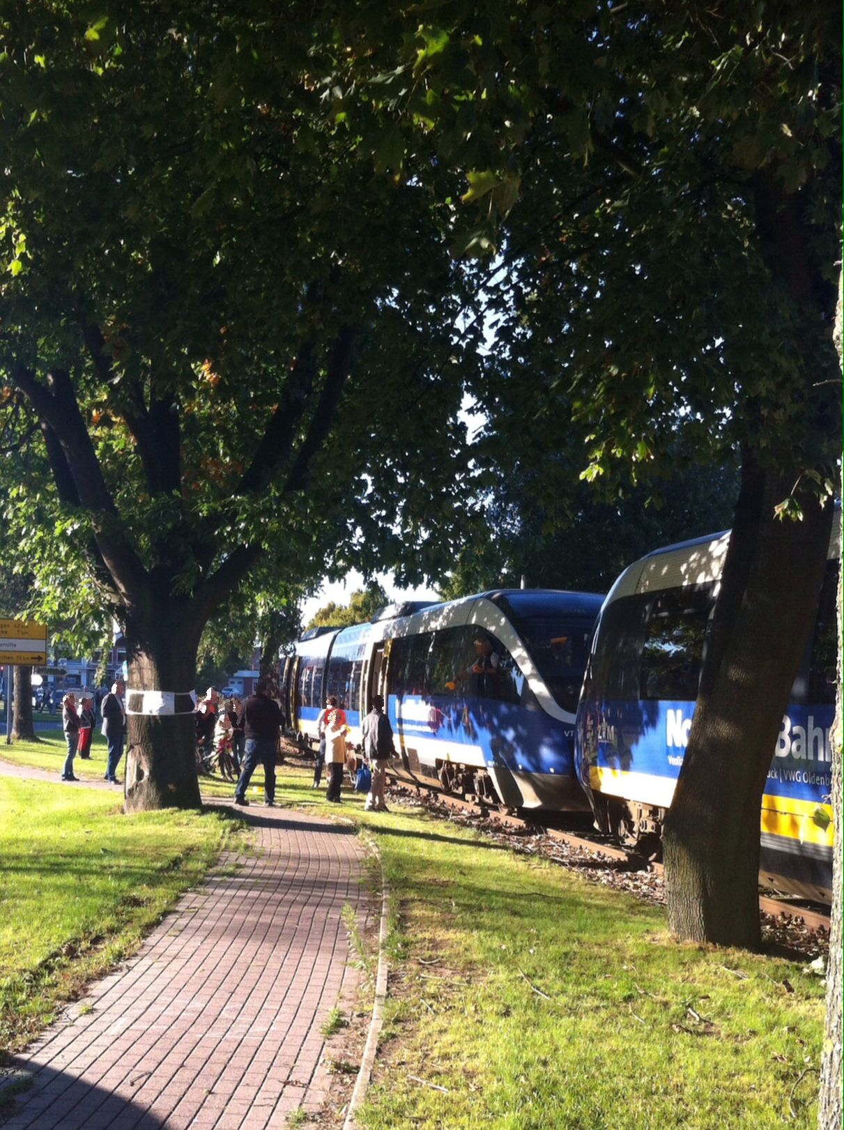 Tecklenburger Nordbahn - Provisorischer Haltepunkt Mettingen